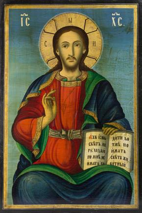 Исус Христос, црква Св. Никола, Тетово. 1904 година. Автори: Крсто и Константин Николиќ и Русалим Крстиќ од Лазарополе. Дим: 70,5 Х 47,5 Х 2 см.